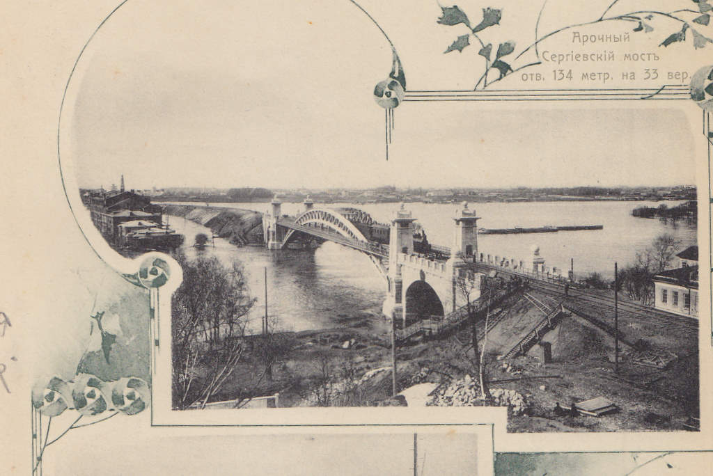 Москва. Московская окр.ж.д. Сергиевский (буд.Андреевский) мост.(открытка). Вид с юга. Снято во время наводнения в апреле 1908г.